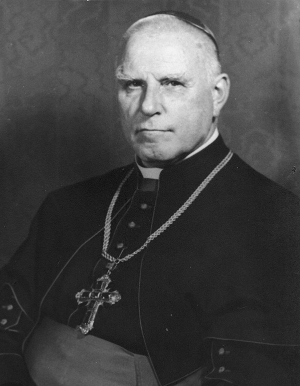 Clemens August Kardinal Graf von Galen (vollständig: Clemens Augustinus Joseph Emmanuel Pius Antonius Hubertus Marie Graf von Galen; * 16. März 1878 in Dinklage, Oldenburger Münsterland; † 22. März 1946 in Münster, Westfalen) war ein deutscher Bischof und Kardinal.